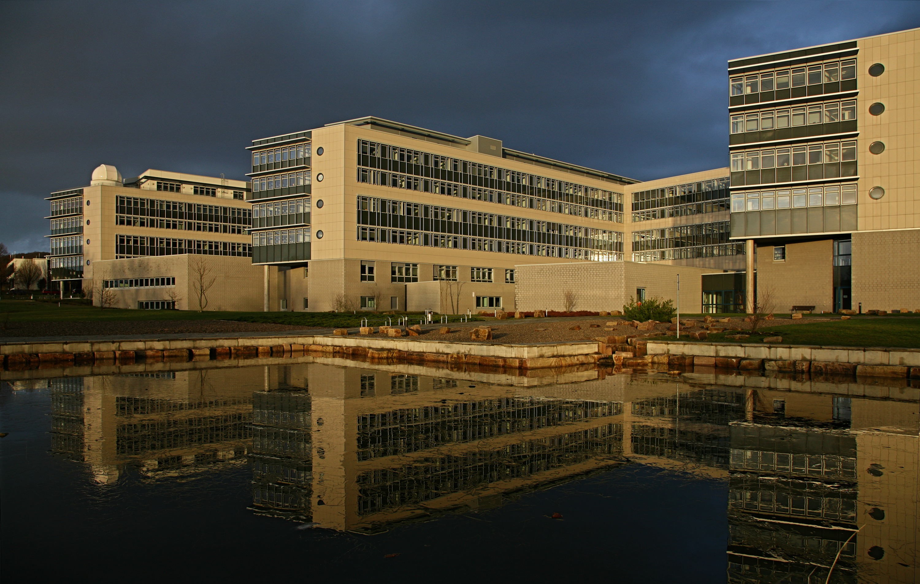 Universität Göttingen, Physikalische Fakultät